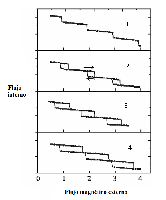 Gráfico que muestra los resultados experimentales del flujo magnético que pasa por el interior de un anillo superconductor (en el eje vertical) de inductancia fija, interrumpido por un dc-SQUID variable de inductancia pequeña, con respecto al flujo externo aplicado. Como se puede observar, el flujo está cuantizado. (Imagen tomada de la versión en italiano, Flux quantization.png, y esta a su vez del artículo de MG Castellano y otros (2003). "Tracing the characteristics of a flux qubit with a hysteretic dc-superconducting quantum interference device comparator". Journal of Applied Physics 94: 7935., uno de cuyos autores es el usuario Pasquale.Carelli que subió la imagen original).